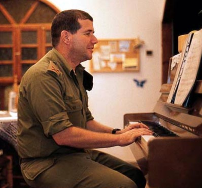 מפקד עוצבת הפלדה, תא"ל איל בן ראובן.